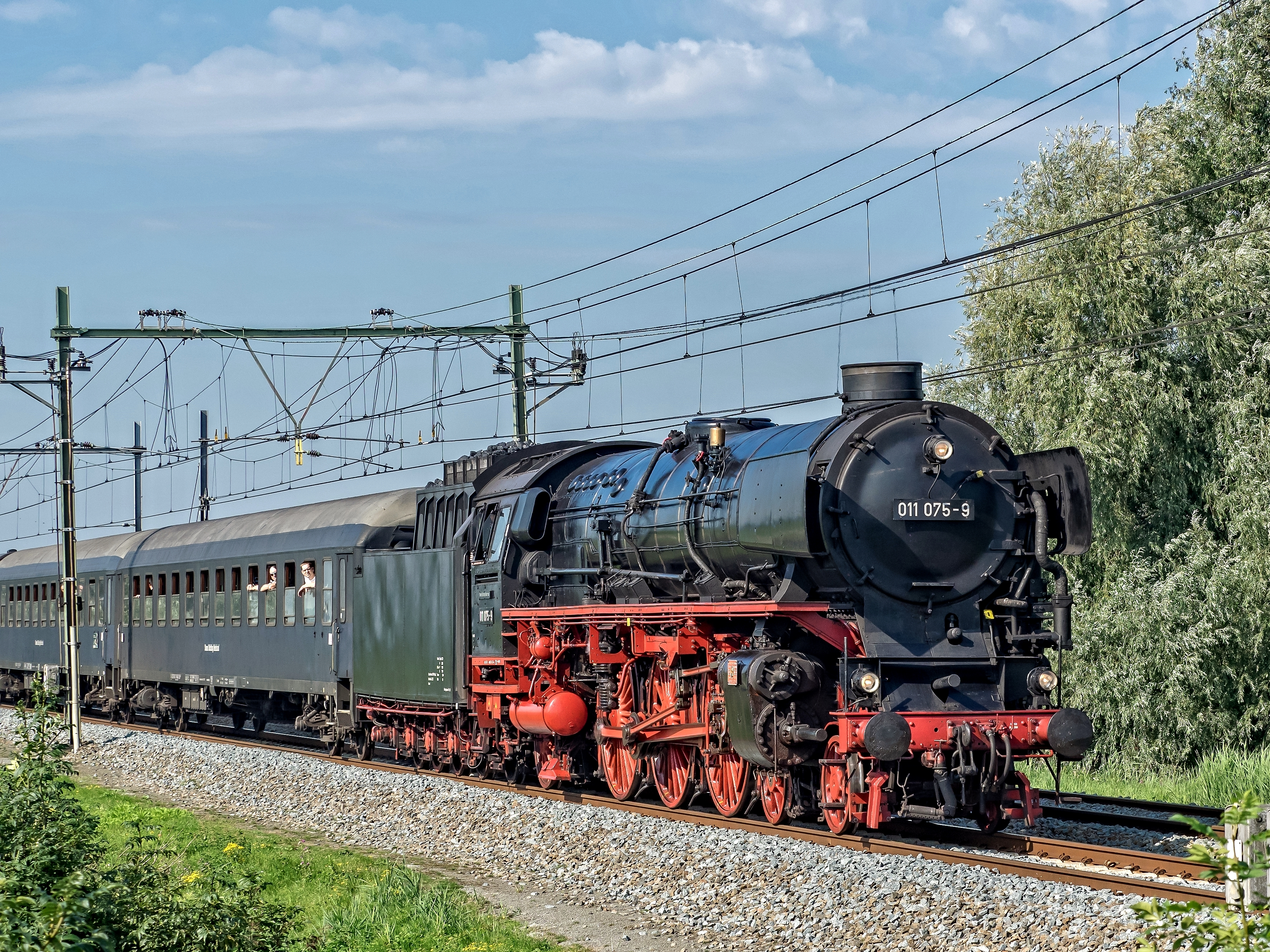 Speciale treinrit. Per stoomtrein opweg naar Sail Amsterdam 2015. Sneltreinlocomotief van de Duitse serie 01 van het Pacific-type, (ex Deutsche Bundesbahn). Deze foto is gemaakt onder het motto: "Zonder geluk vaart niemand wel". Had mij n.l. vergist in de vertrektijd van deze trein. Eenmaal aangekomen had ik geen tijd meer om mijn fototoestel op de juiste waarden in te stellen.